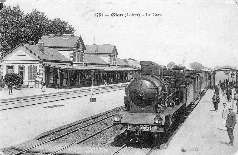 Carte postale ancienne de la gare de Gien, Loiret, France